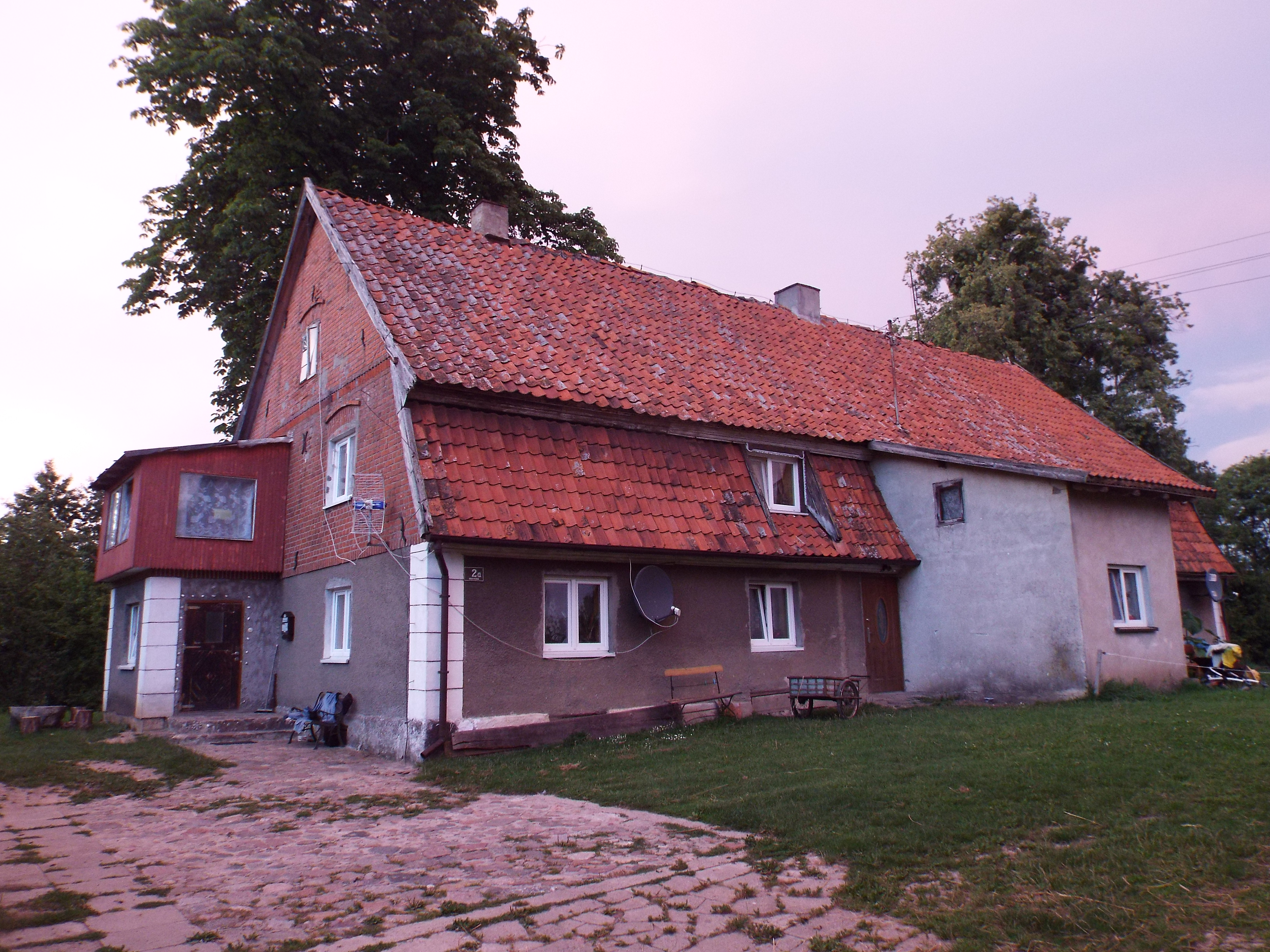 Brzezina - budynek mieszkalny